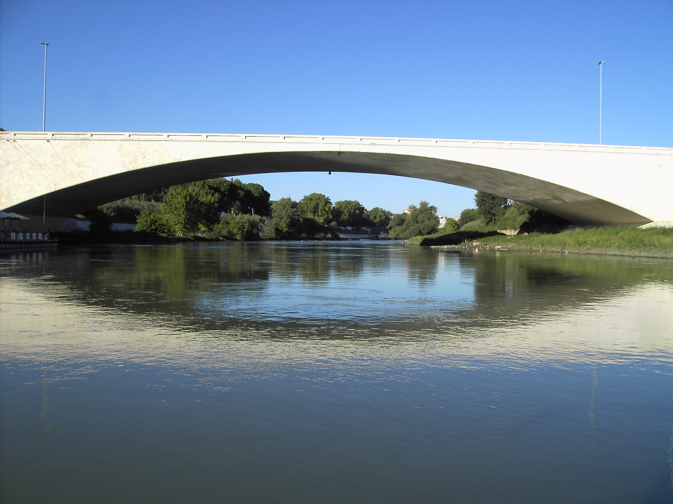 Roma, Tevere a Ponte Duca d'Aosta